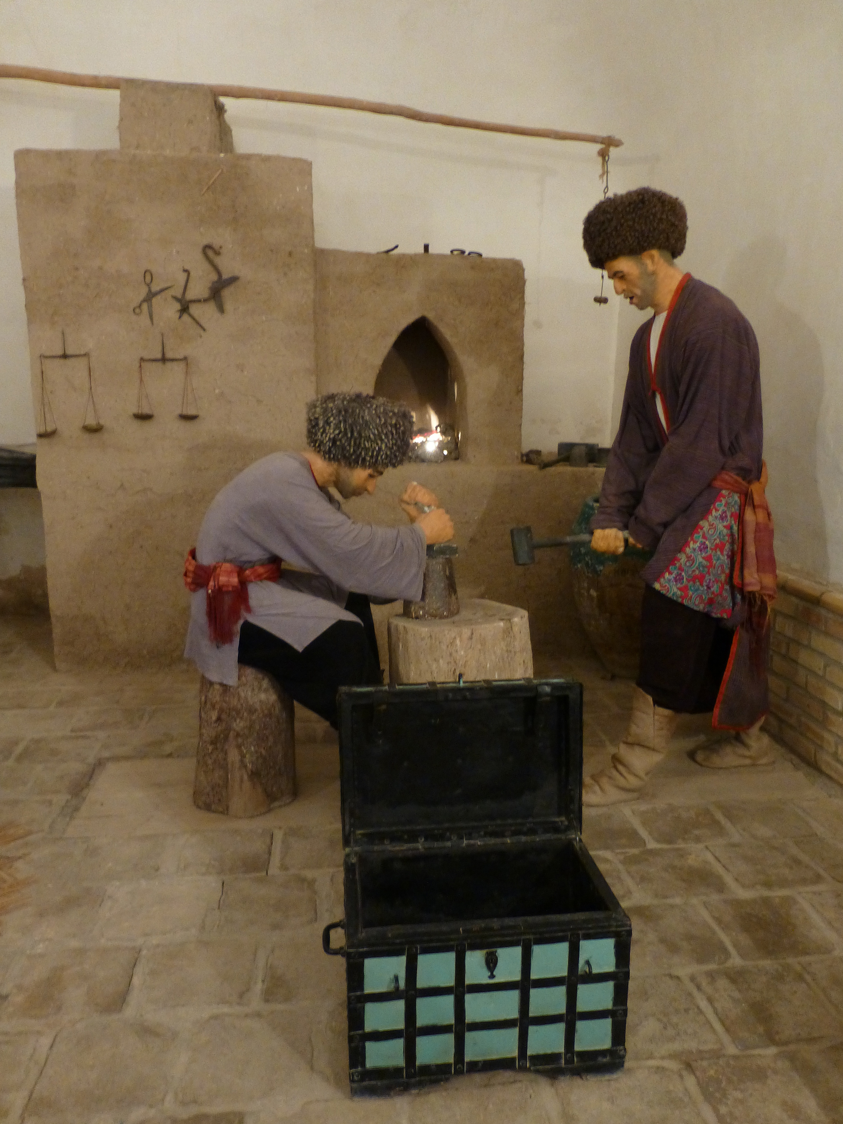 Frappeurs de monnaie (reconstitution). Museum of Ancient Khorezm. Khiva (Ouzbékistan)